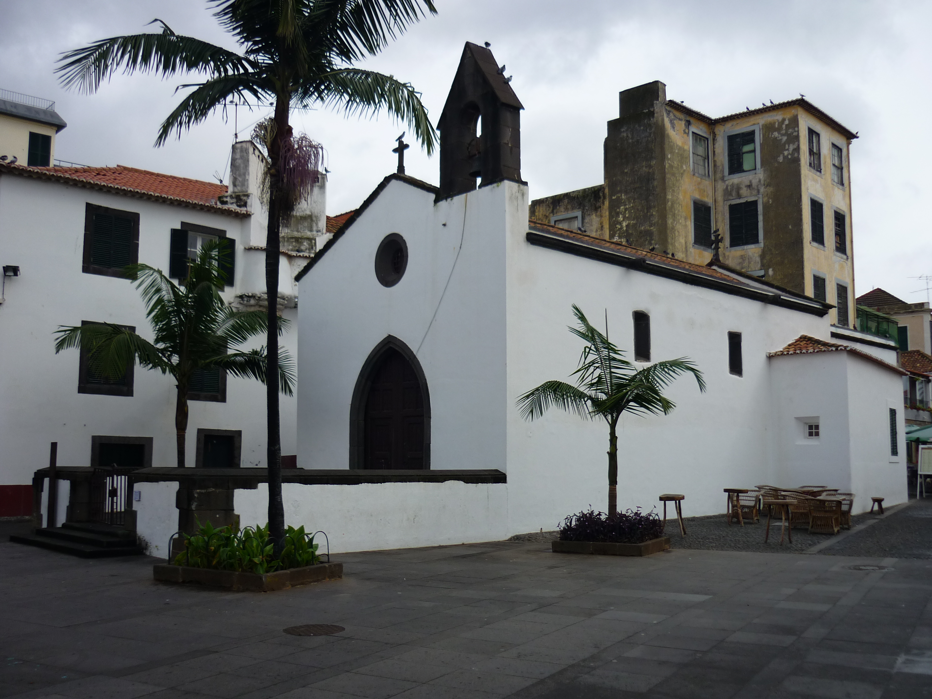 Mindenszentek kápolnája (Capela do Corpo Santo) Funchalban (Madeira)